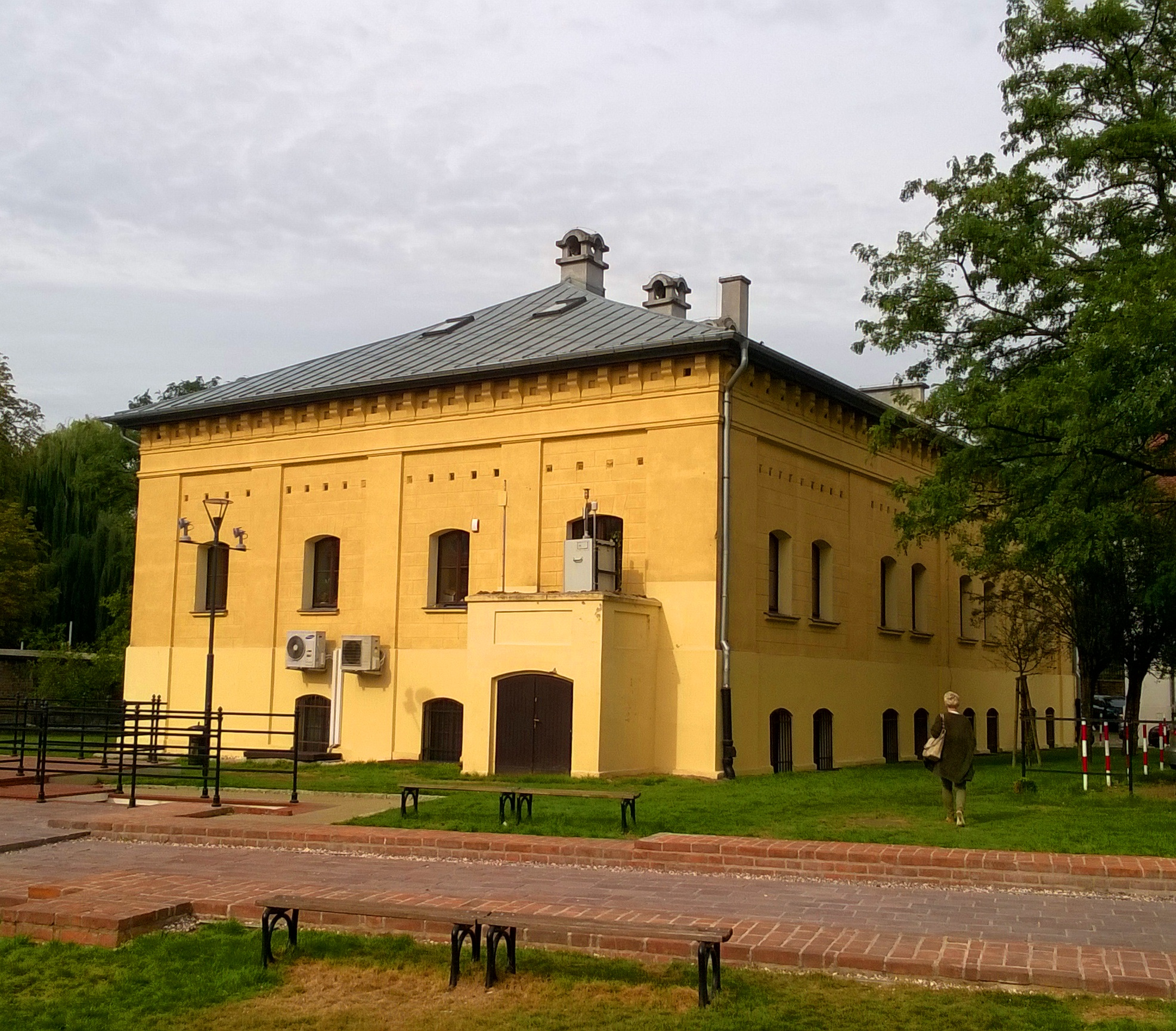 Dawna piekarnia wojskowa Twierdzy Toruń